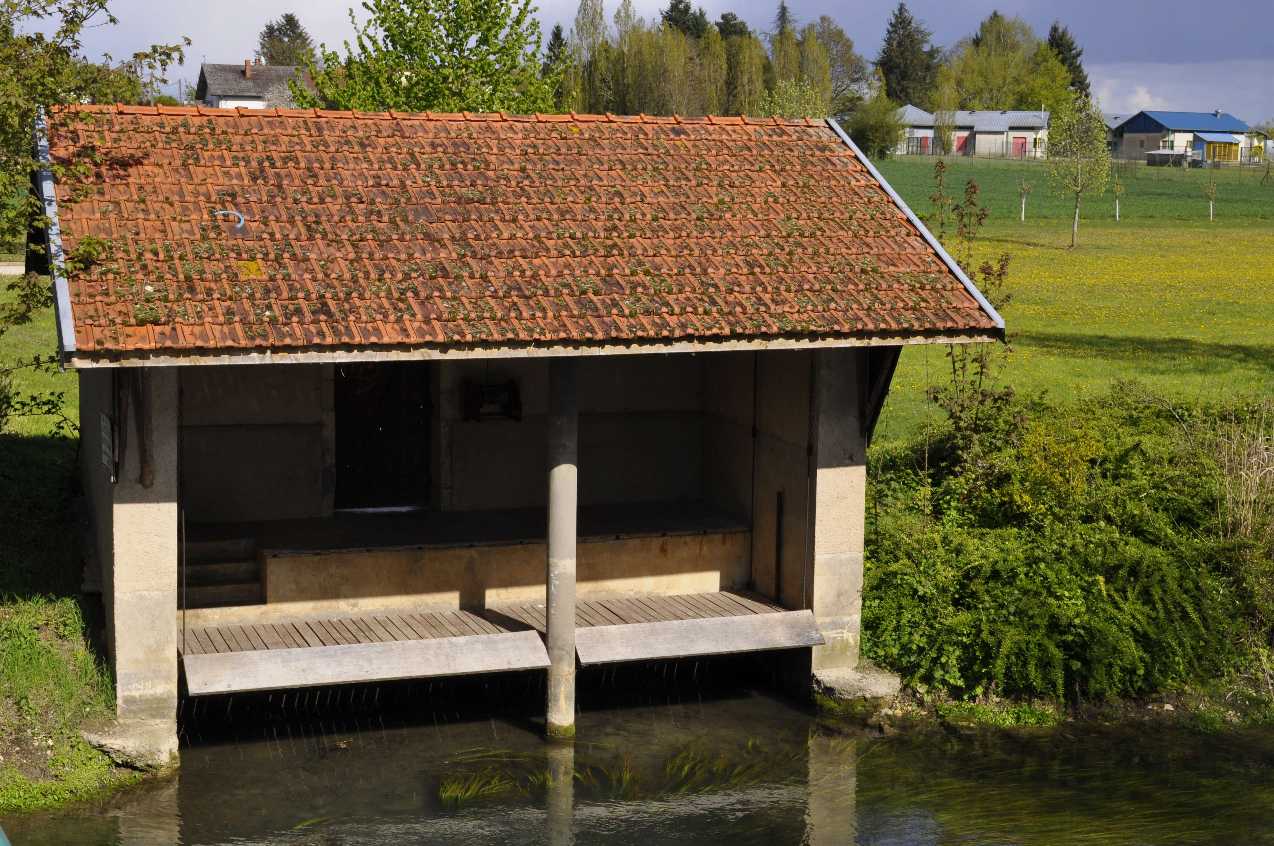 Lavoir sur la Bèze à Bezouotte (Côte d'Or).